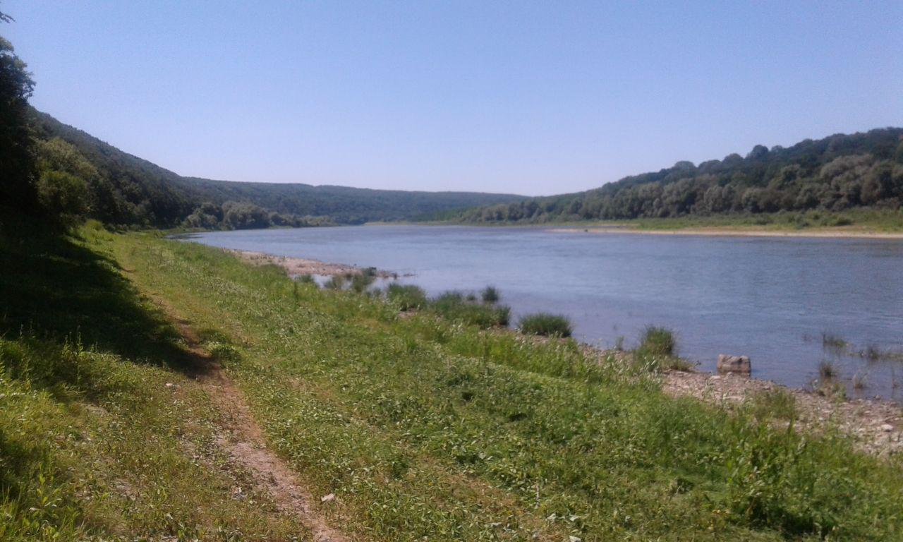 Вид на річку Дністер